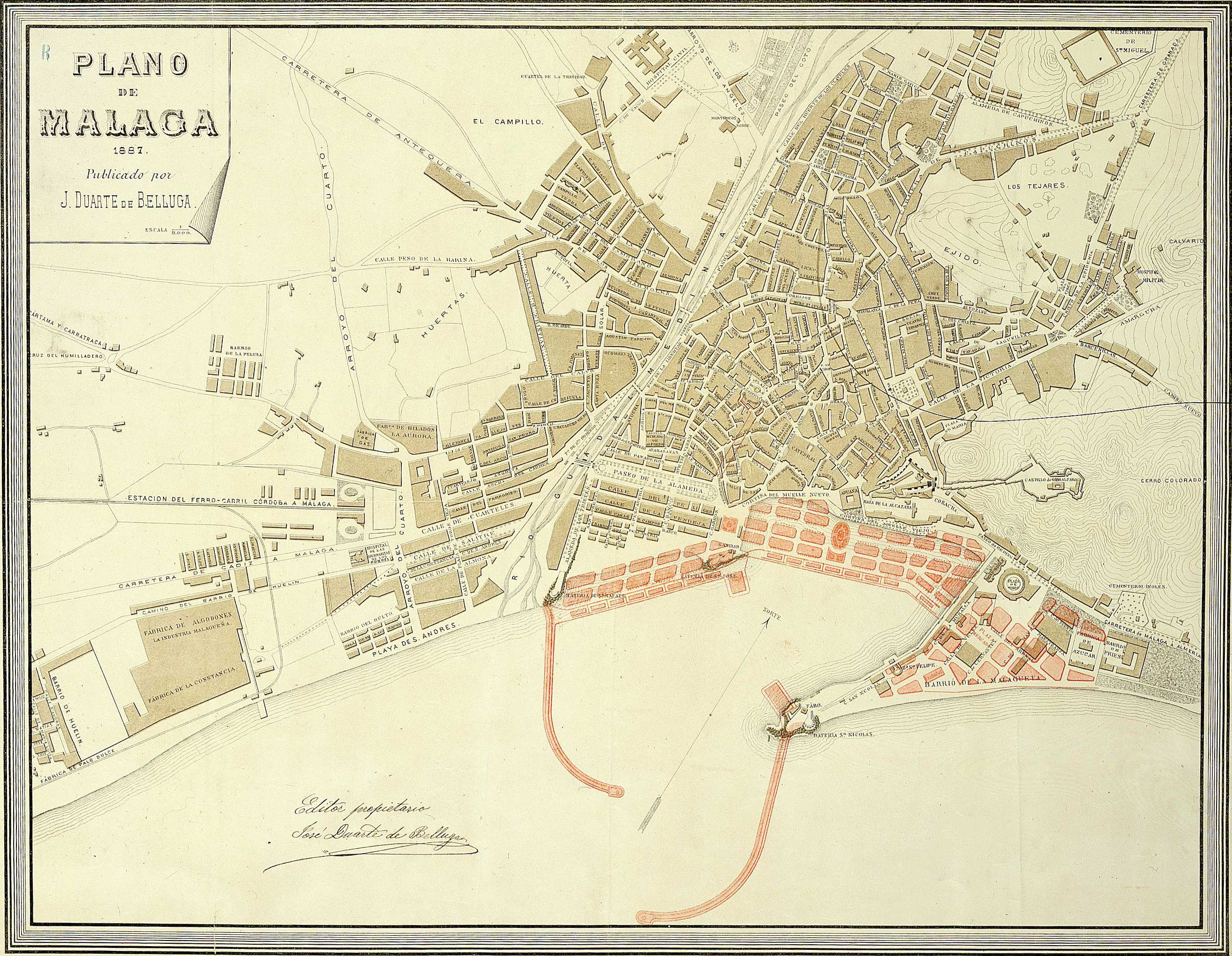 Tipo de Documento Material cartográfico Título Plano de Málaga 1887 Málaga . Planos de población 1887 Autor Duarte de Belluga, José . Editor [S.l.] Publicado por J. Duarte de Belluga Fecha 1887 Descripción Física 1 plano 40 x 50 cm Descripción Orientado con flecha con el N. al NE. del plano.- Relieve por curvas de nivel Materia Material cartográfico